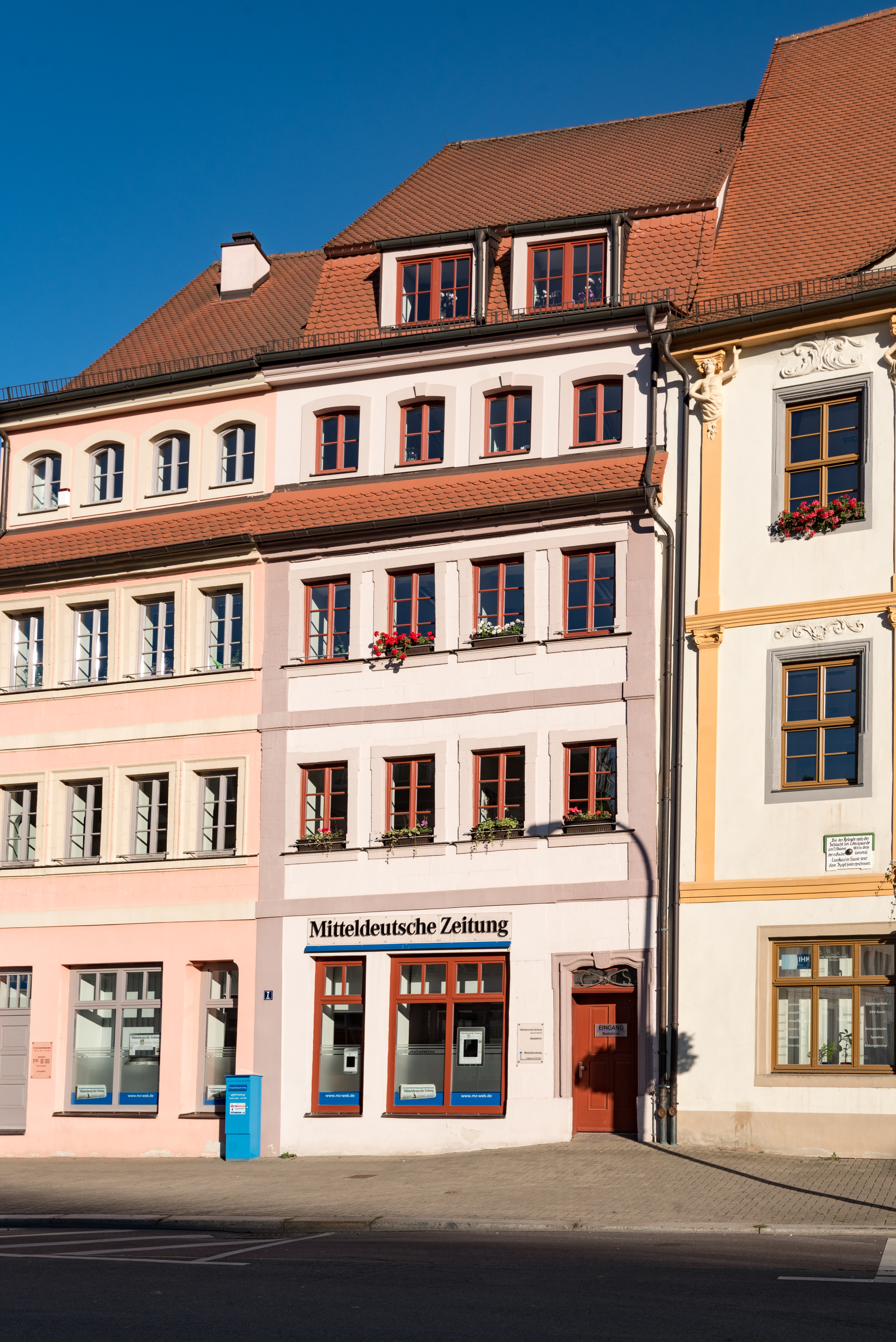 Weißenfels, Markt 7